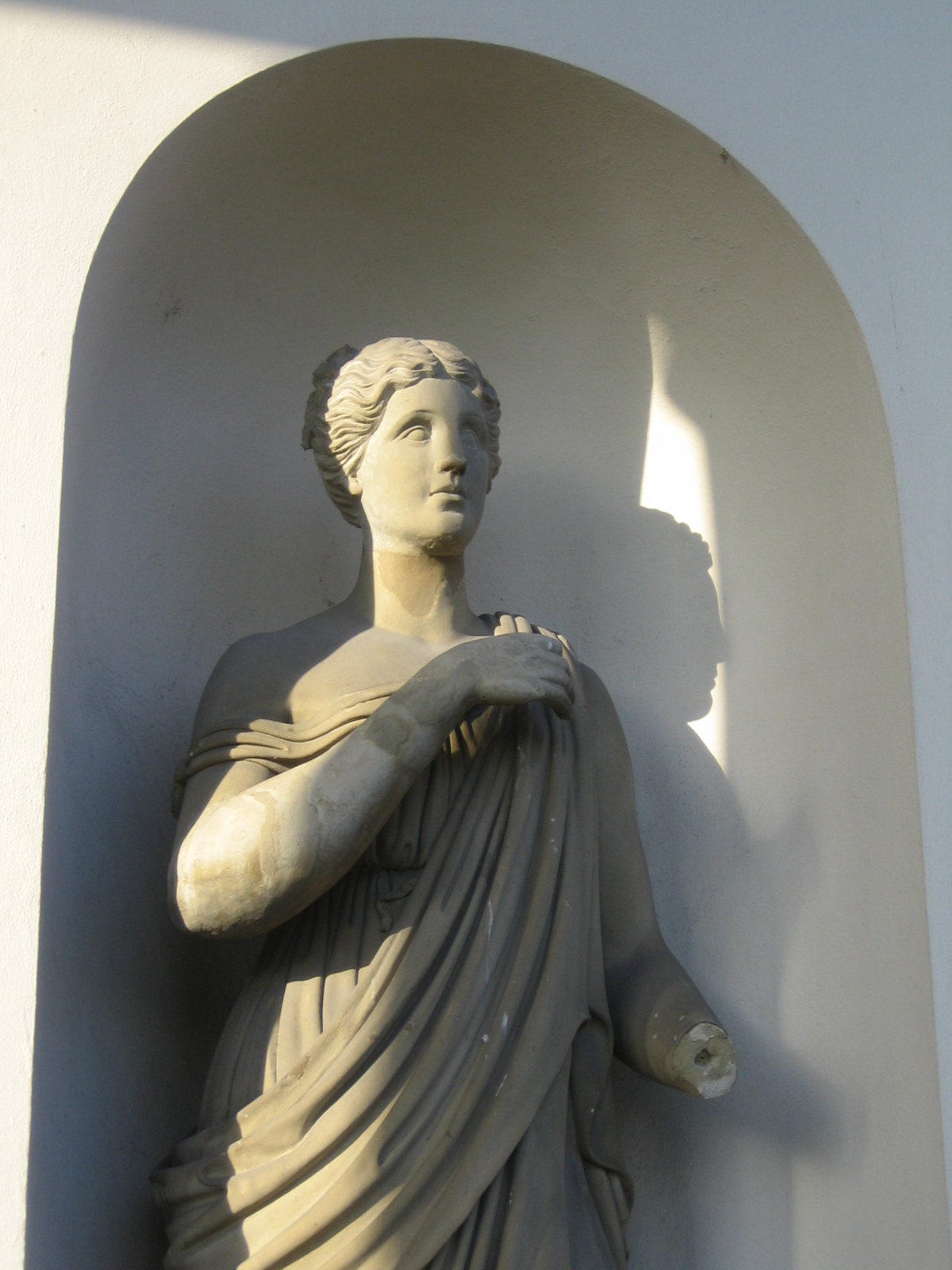 Muse Euterpe am Schloss Rosenstein, Bad Cannstatt. Bildhauer Theodor Wagner ca. 1842